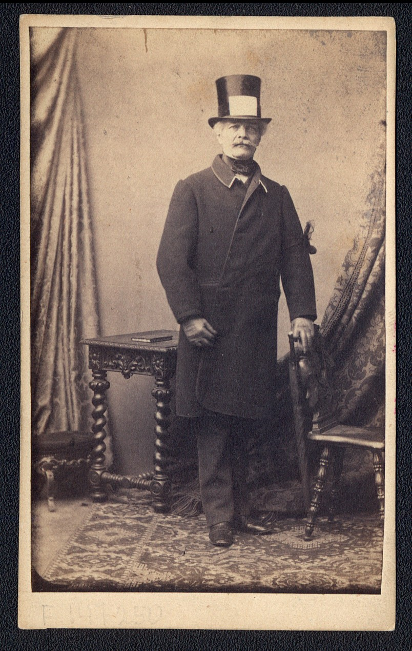 Konstanty Fiszer, 1861 r.